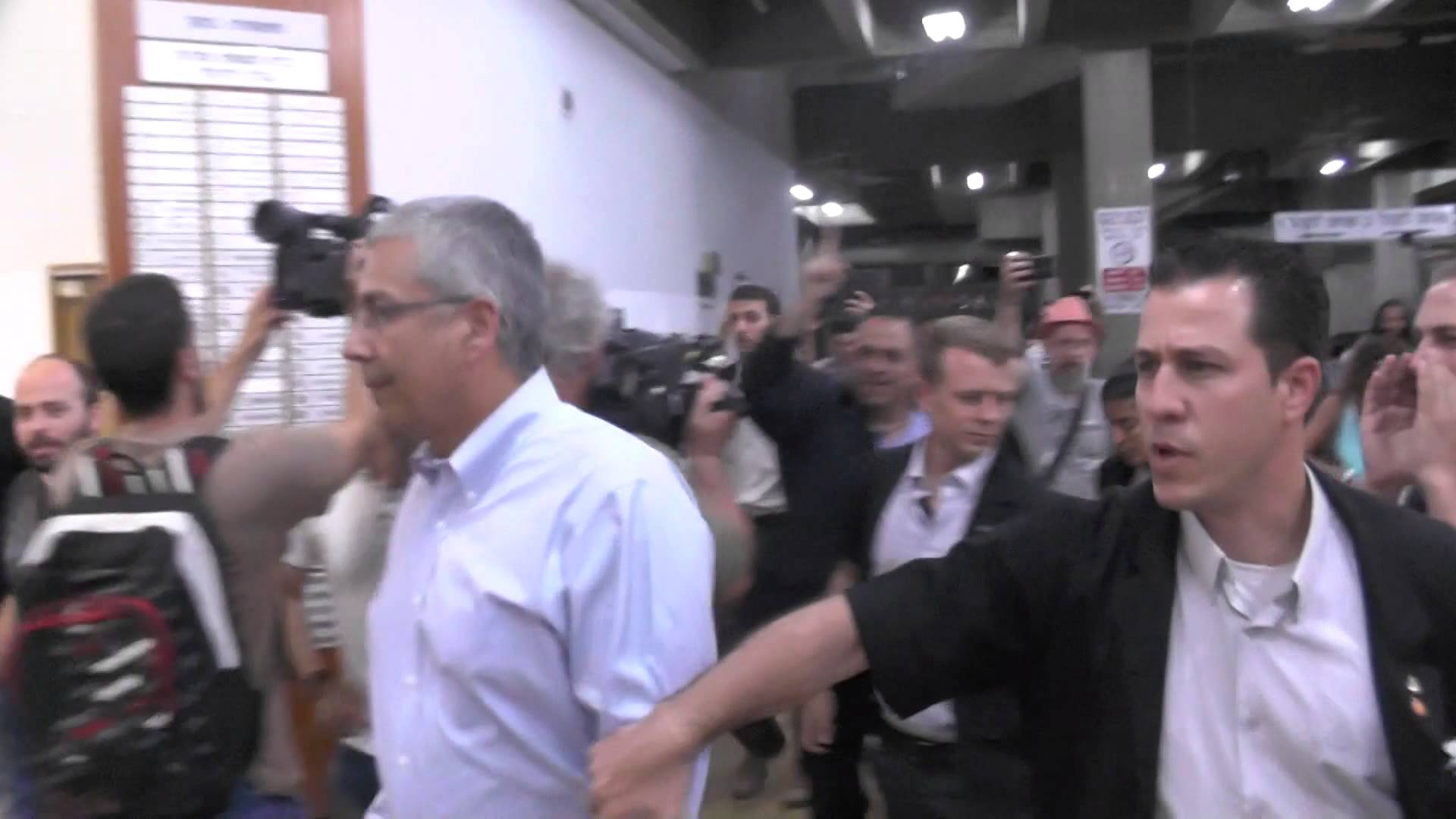 ציון קינן בבית המשפט